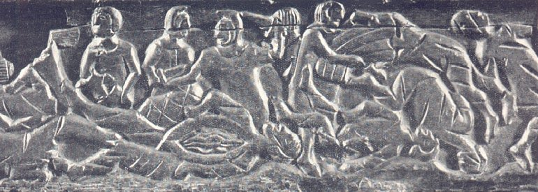 Kist van Oxford